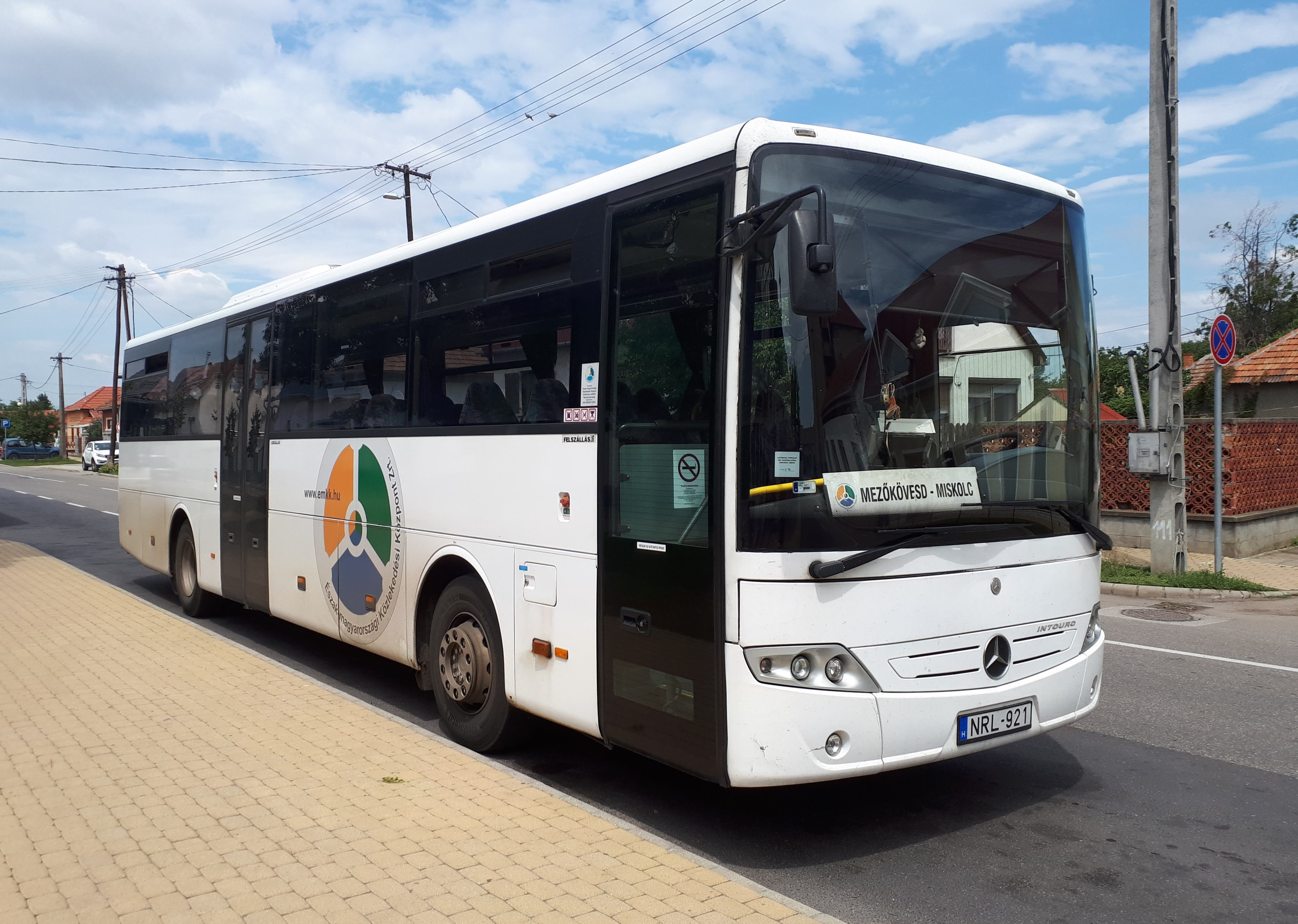 Az ÉMKK NRL-921 rendszámú Mercedes Intouro busza Mezőkövesden, a 3749-es helyközi járaton.